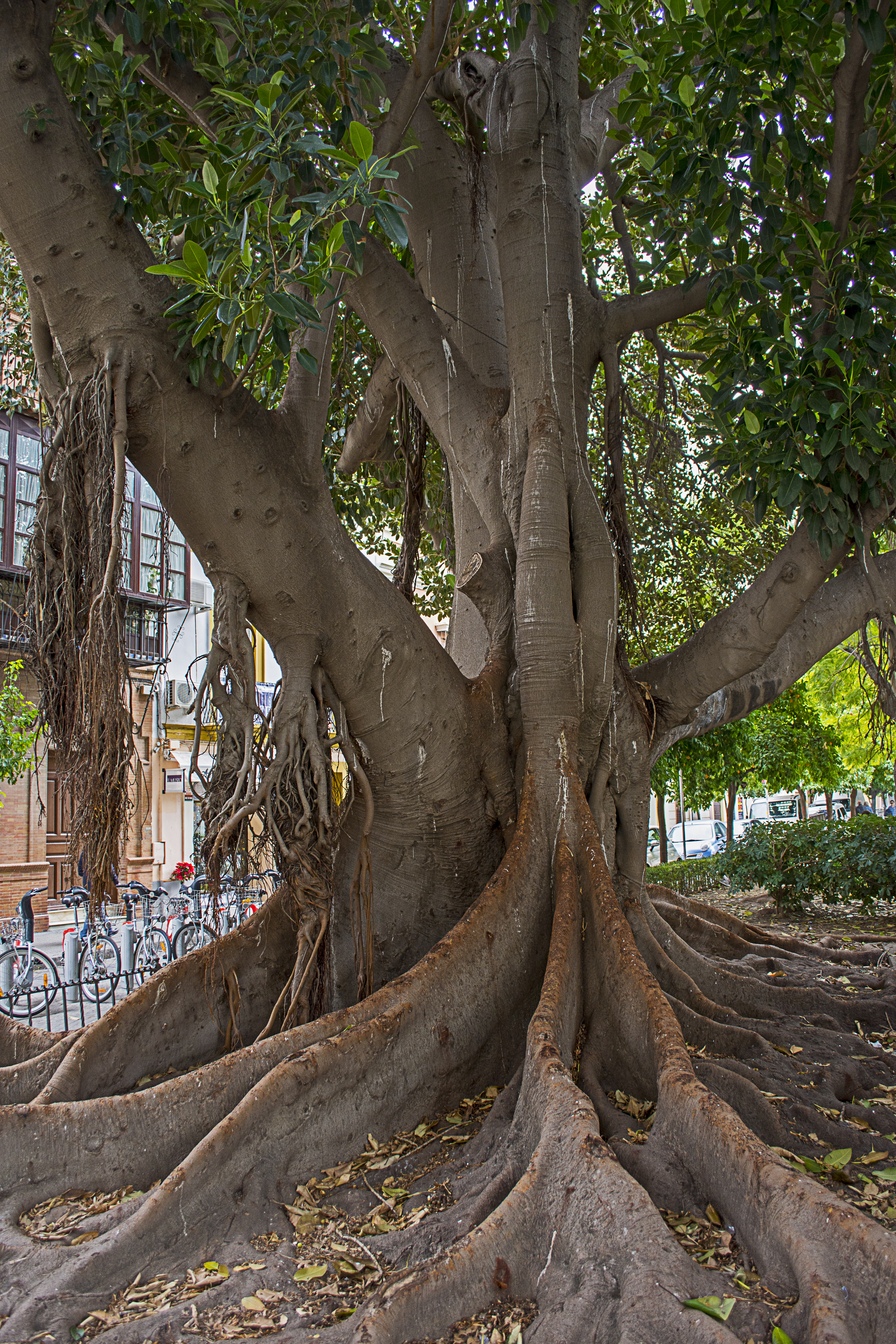 Ficus macrophylla en la plaza del museo de Sevilla. (España)